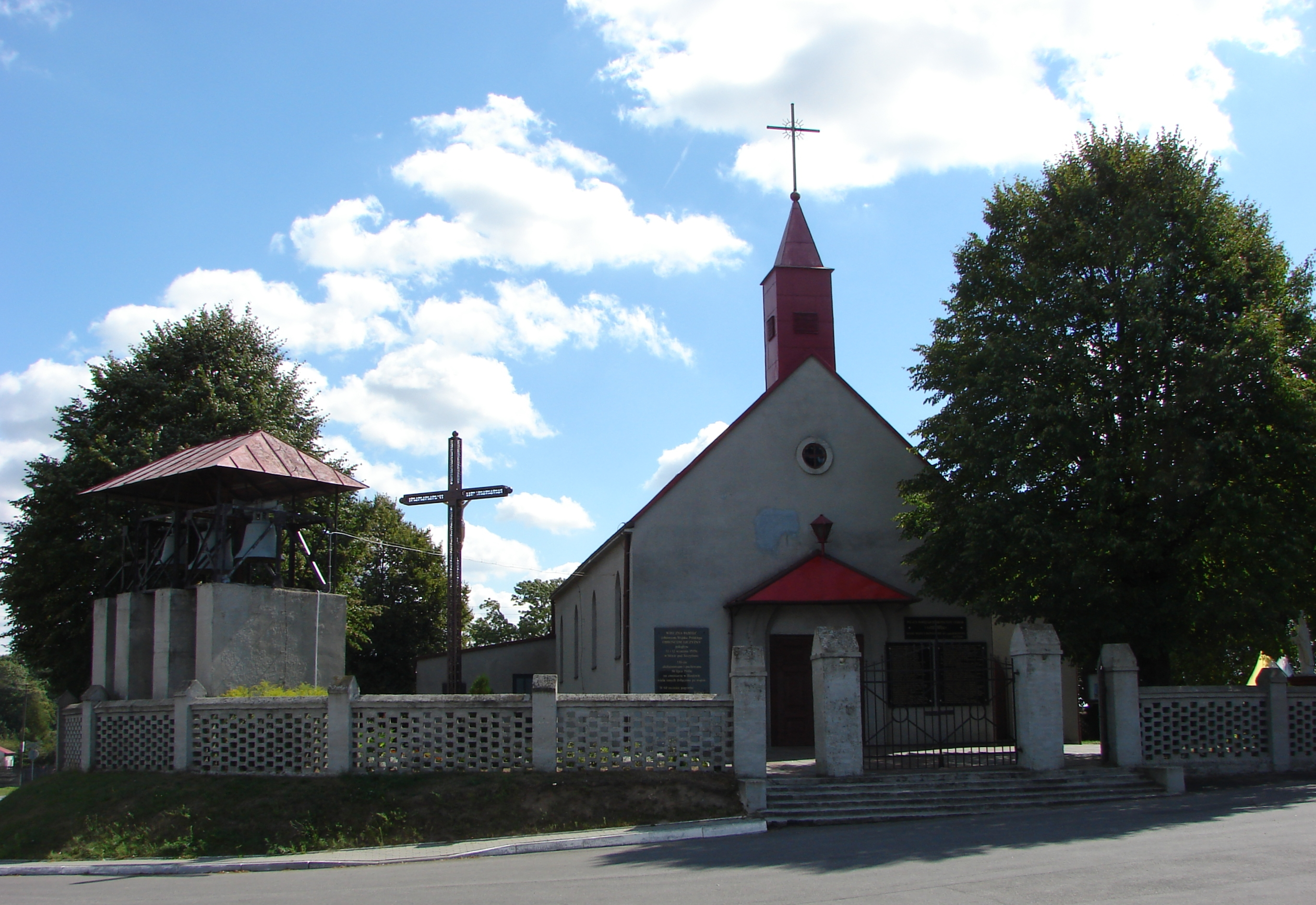 Boniewo, kujawsko-pomorskie, kościół